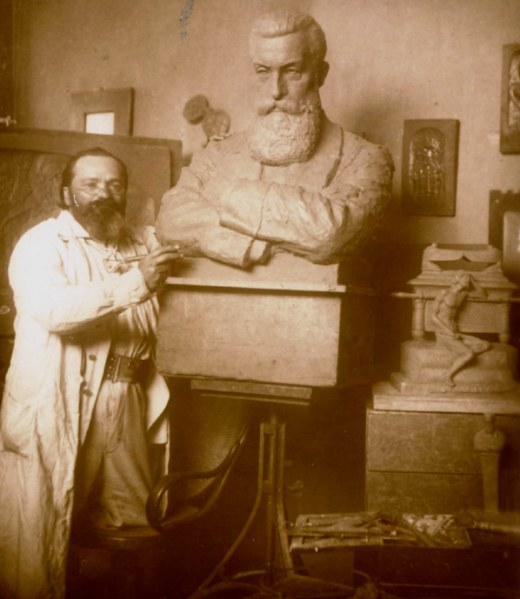 בוריס ש"ץ בסטודיו שלו מפסל את דמותו של הרצל.